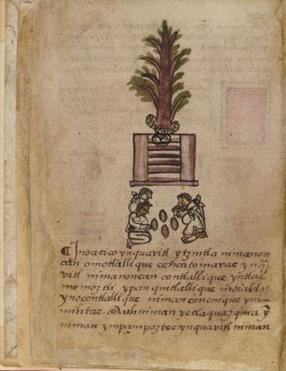 Pagina 109 en el Codice Aubin